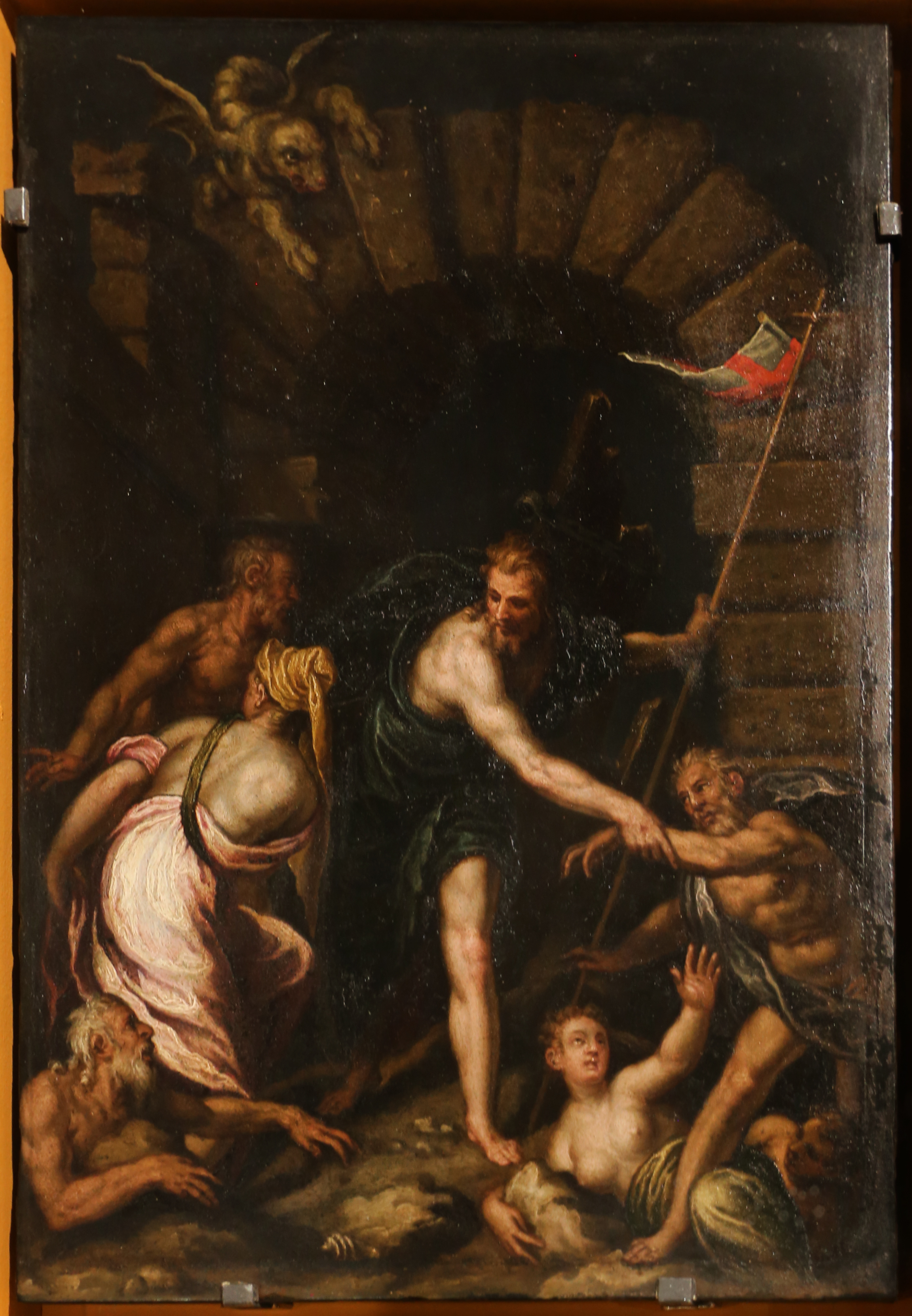 Museo di Castelvecchio This is a photo of a monument which is part of cultural heritage of Italy.